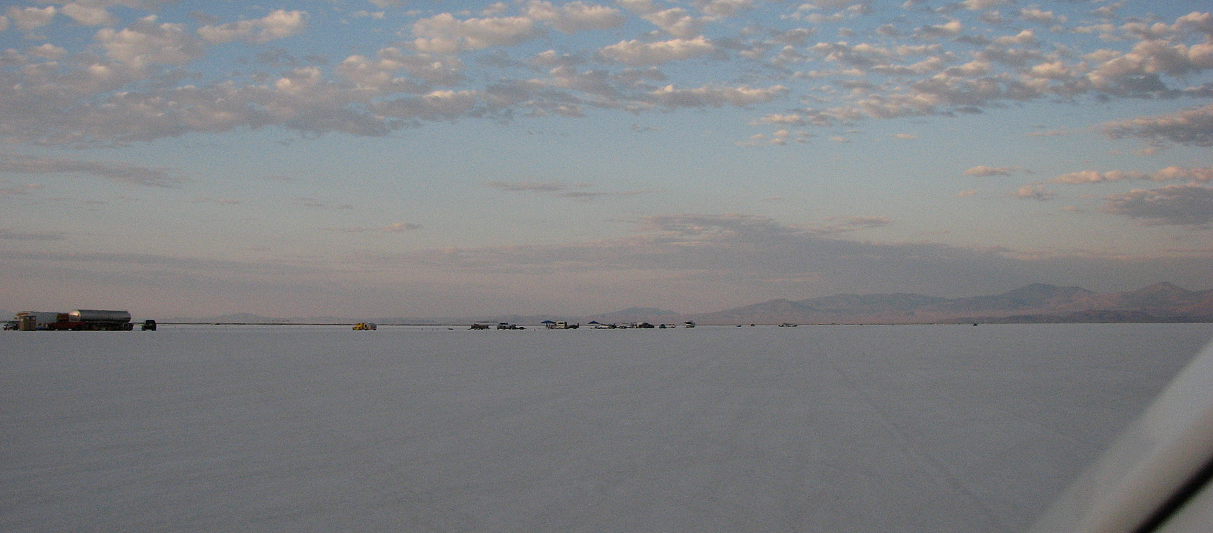 Dawn, Speed Week, 2009